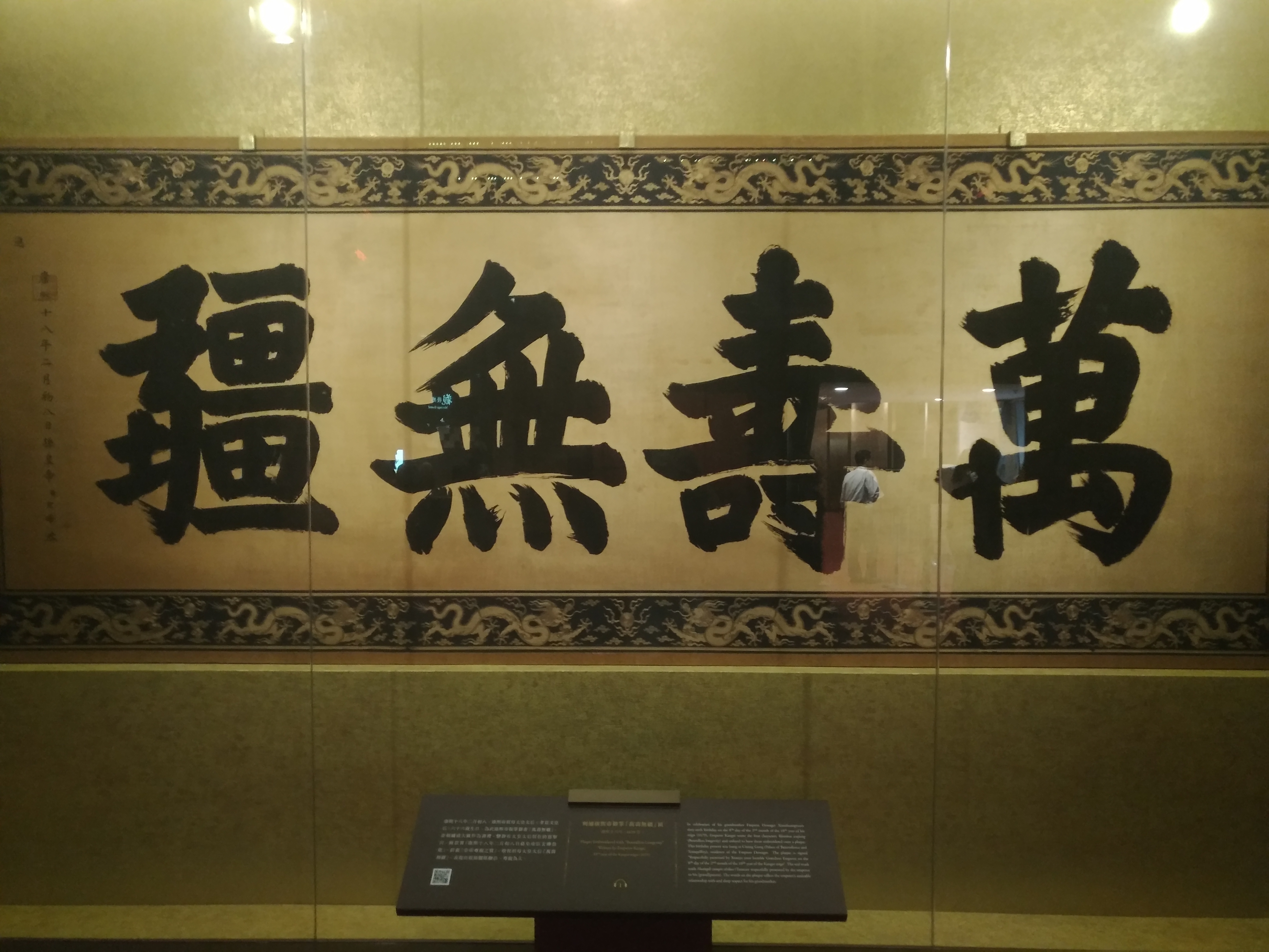 康熙親筆御書刺繡成壽禮的「萬壽無疆」大匾